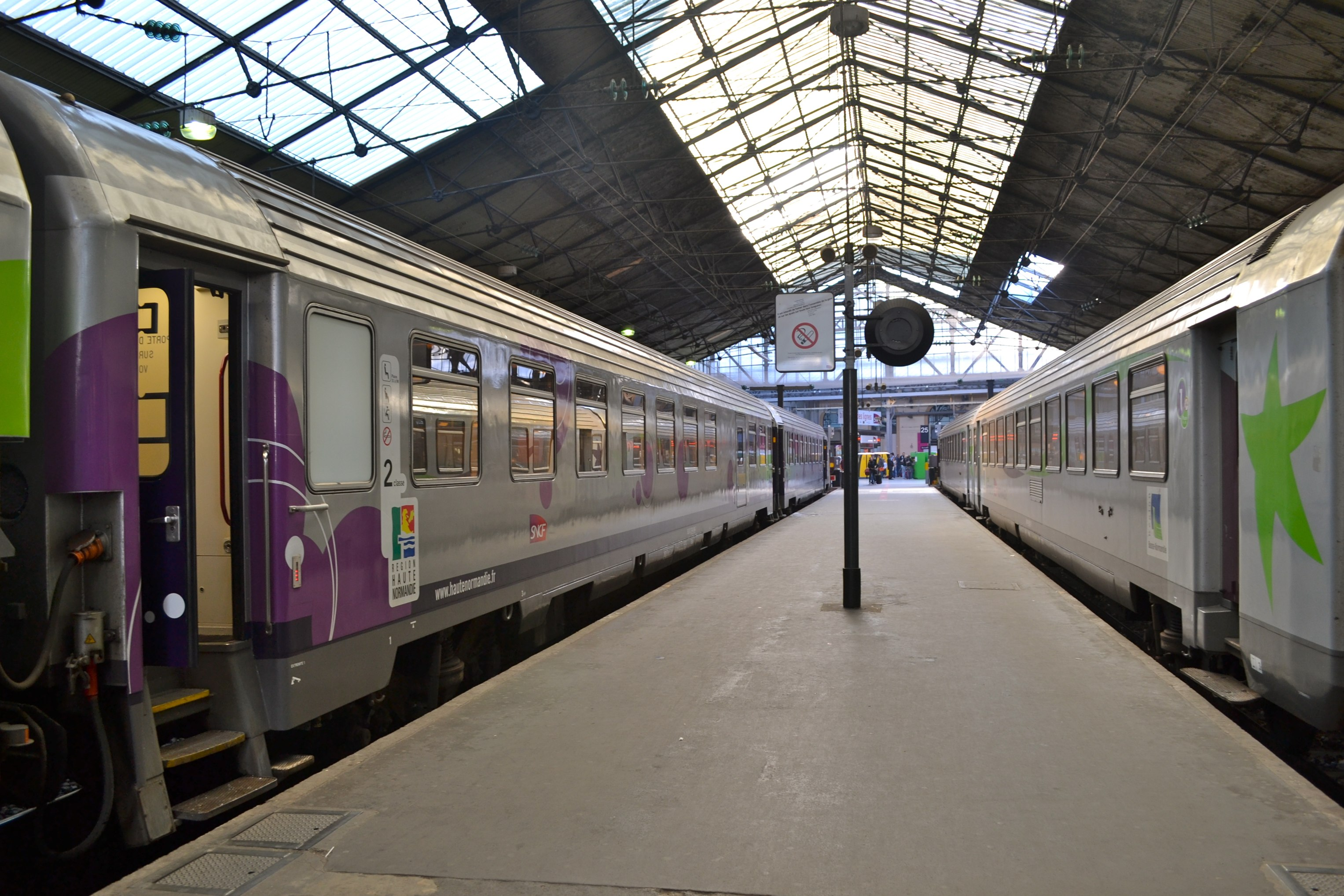 Gare Saint-Lazare, Paris.